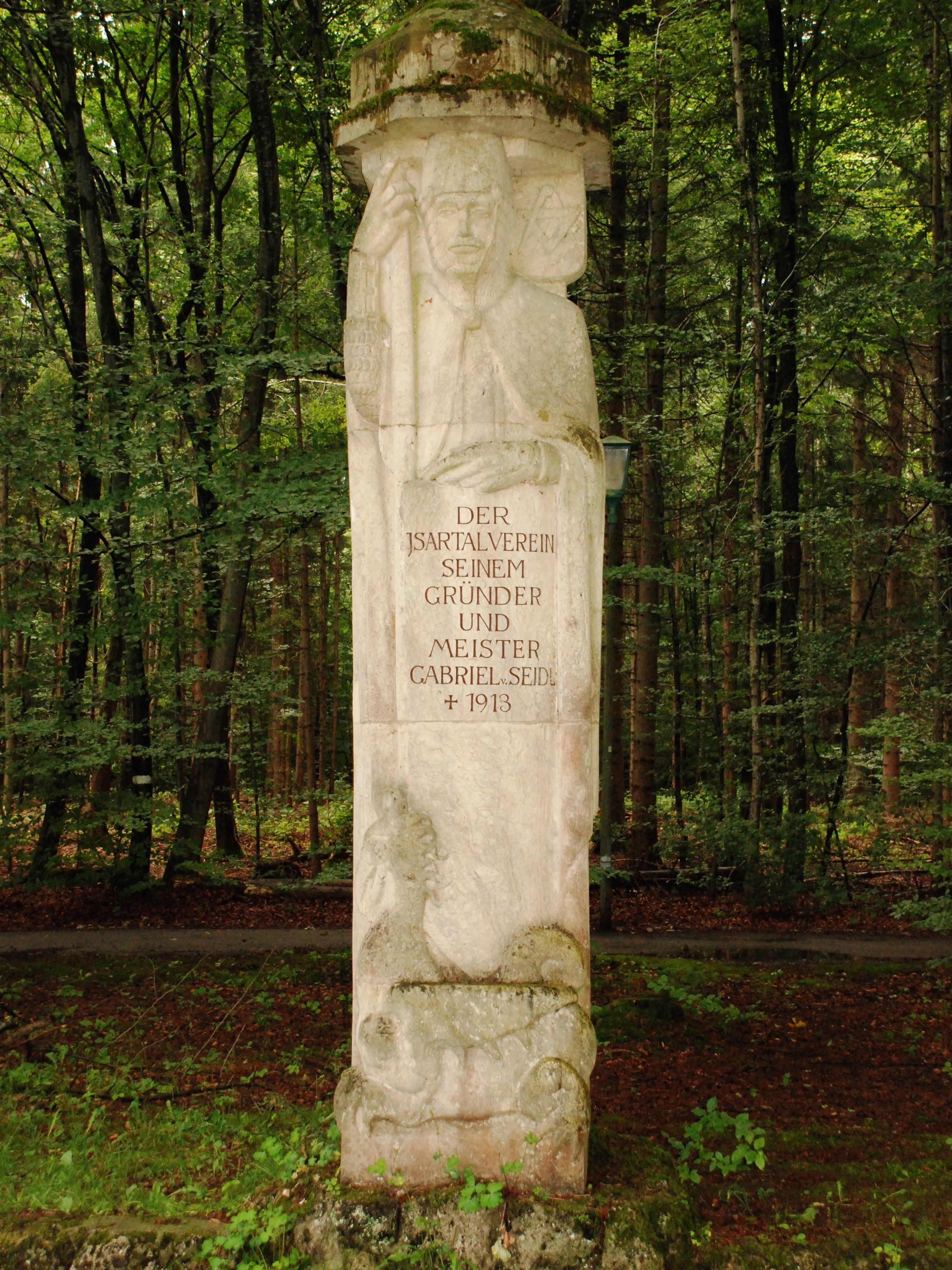 Denkmal des Isartalvereins für seinen Initiator, Architekt Gabriel von Seidl (1848 - 1913), am Josef-Breher-Weg / Hochleite in Pullach im Isartal, Landkreis München, Bezirk Oberbayern, Bayern. Als Baudenkmal in der Bayerischen Denkmalliste unter Aktennummer D-1-84-139-12 aufgeführt. Laut Denkmalliste erschaffen von Julius Seidler, bezeichnet mit 1922. Foto gemäß den Voraussetzungen zur Panoramafreiheit von öffentlicher Verkehrsfläche aus aufgenommen.